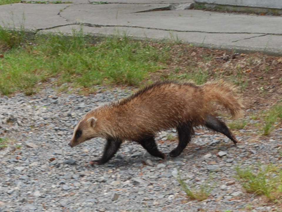 栃木県奥日光千手ヶ浜